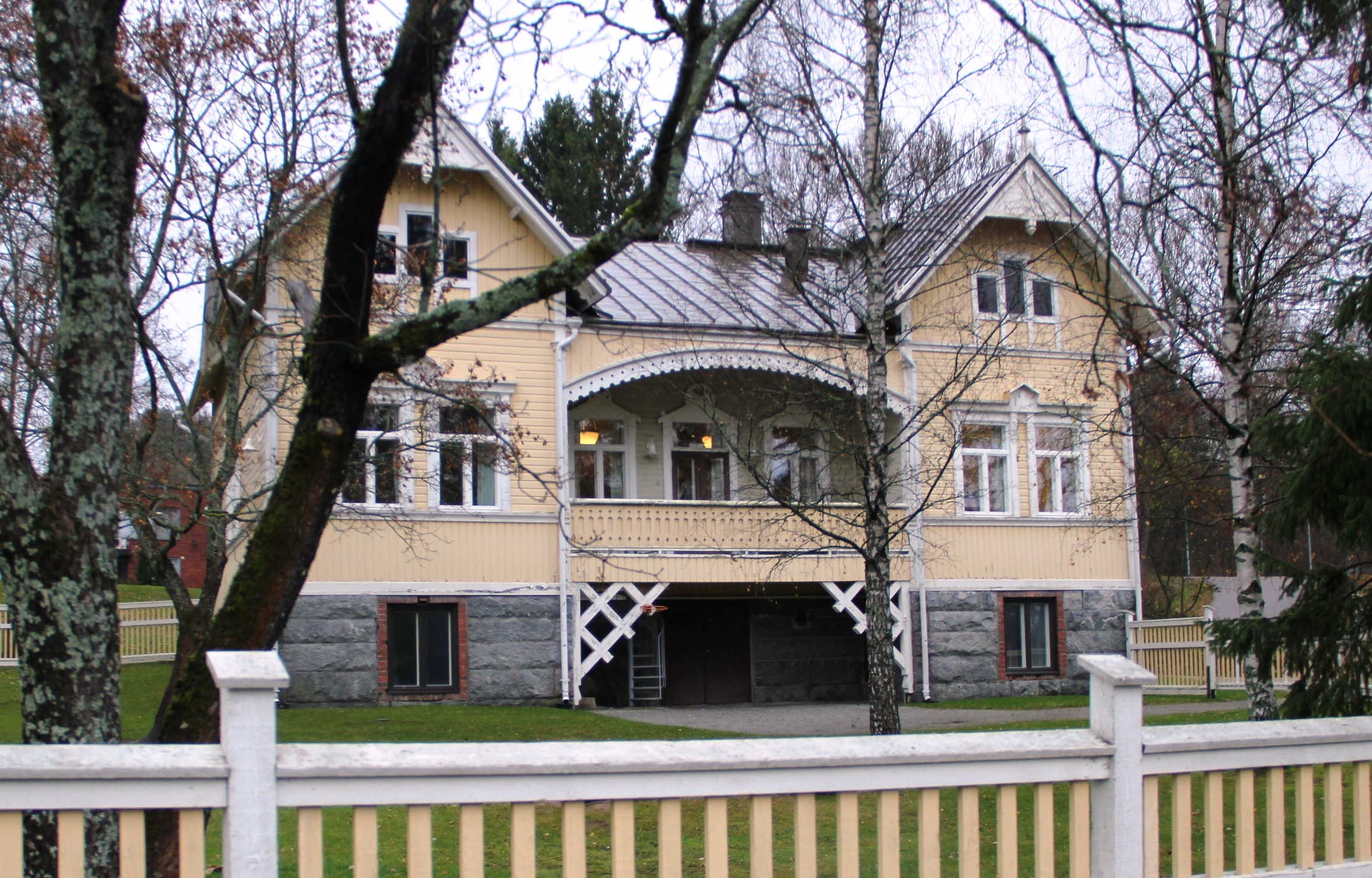 Nykyisin seurakunnan päiväkerho, sijainti Halikon kirkkoa vastapäätä